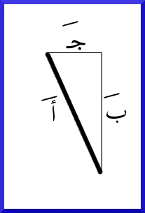 توضيح لدوران الضلع أَ